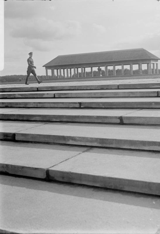 Ordensburg Crössinsee 13.10.1937